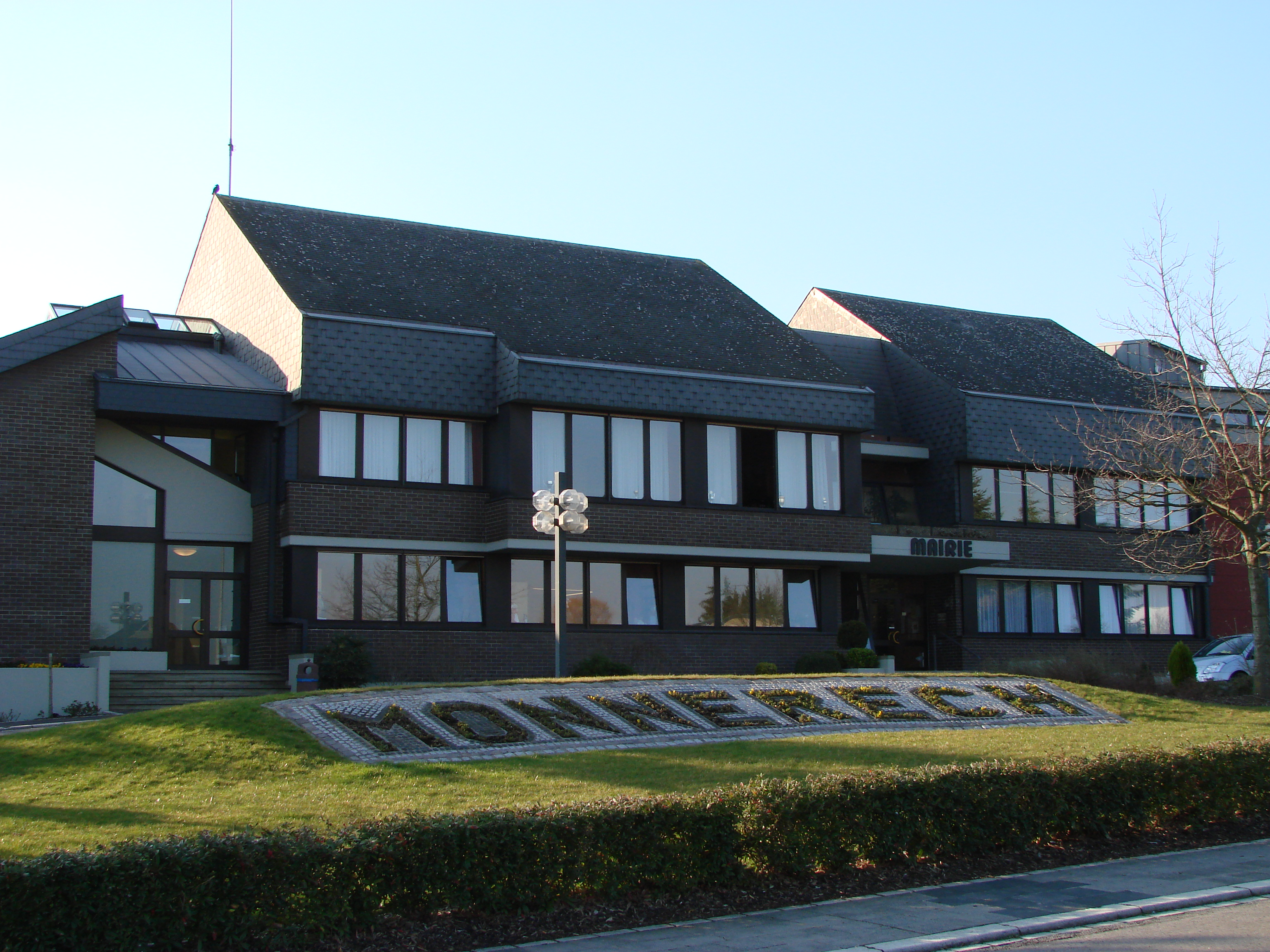 Gemeng vun Monnerech (de: Rathaus von Monnerich, fr: Mairie de Mondercange)